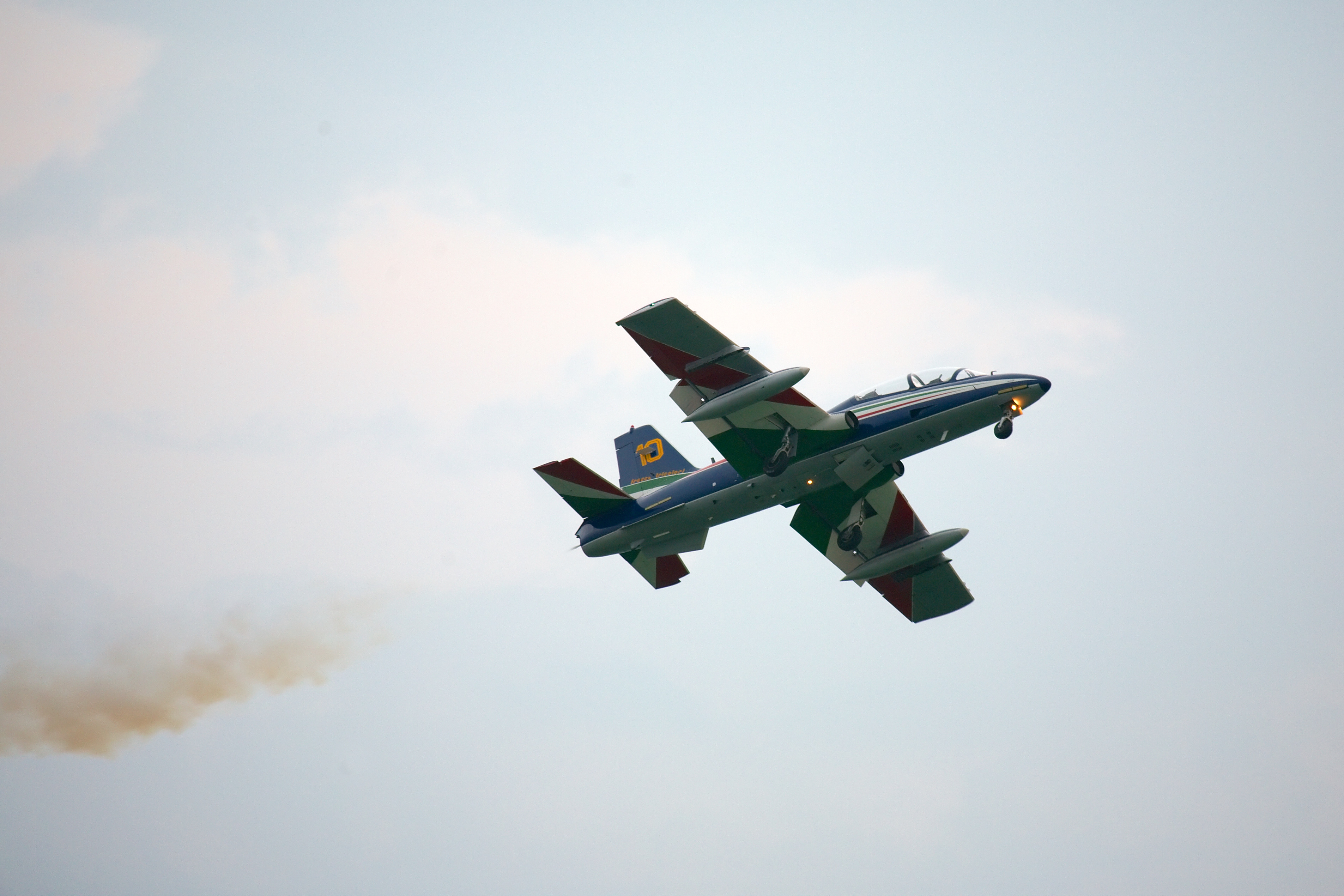 Frecce Tricolori during "Air Extreme" 29.08.2009 in Jesolo